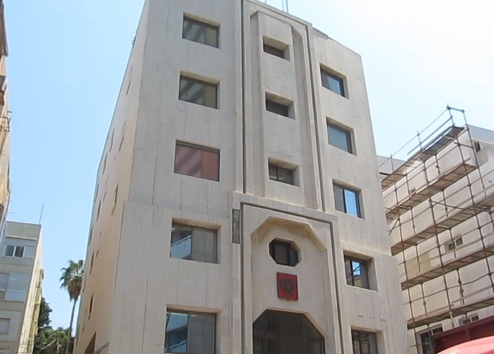 בניין שגרירות רוסיה בישראל - רחוב הירקון 120 תל אביב